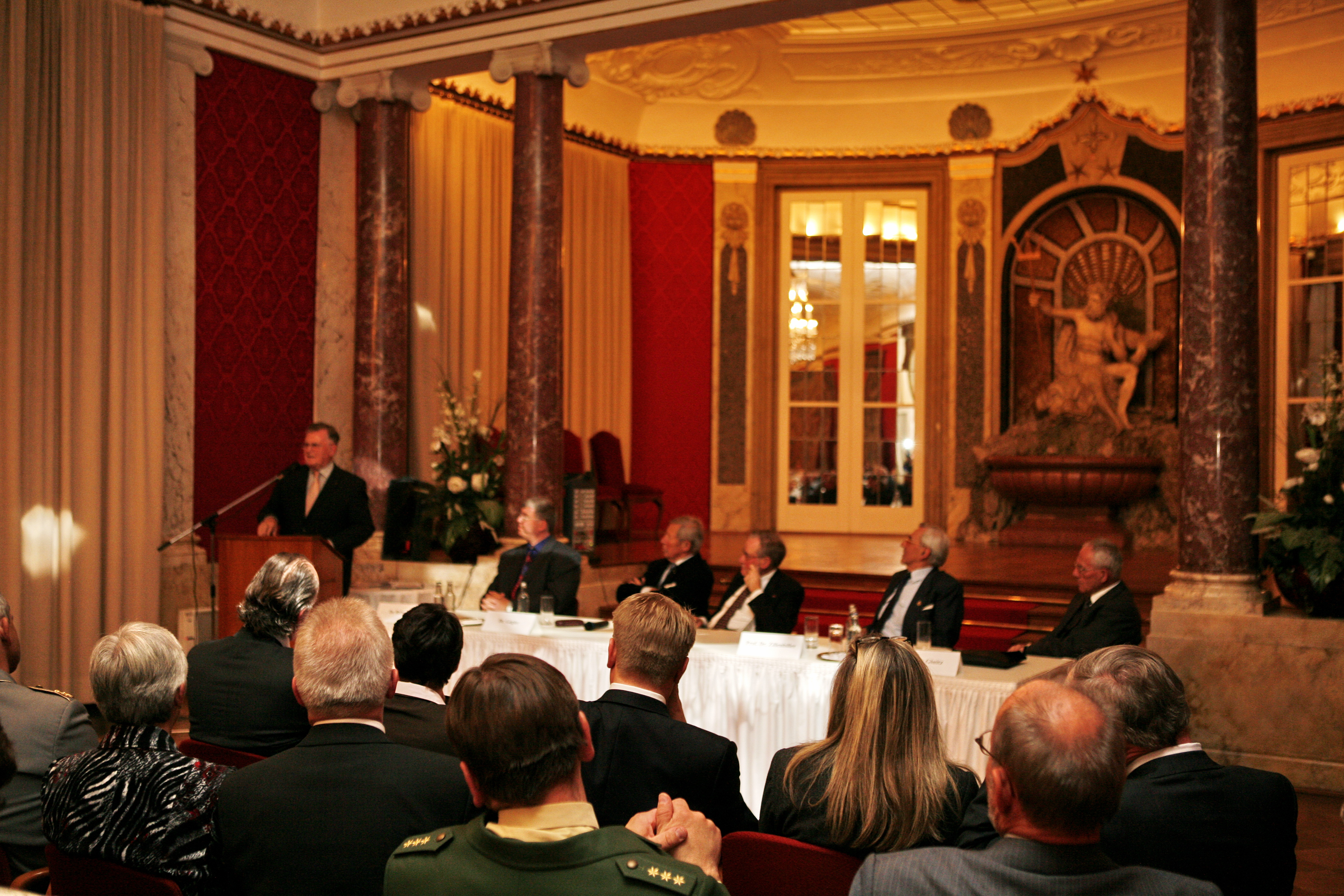 100-Jahrfeier Stefan Fink im Schloss Sigmaringen. September 2008. Weggefährten und Festredner (v. li.): Erwin Teufel (ehemaliger Ministerpräsident des Landes Baden-Württemberg), Dr. Frank Raberg (Historiker und Politologe), Max Gögler (ehem. Regierungspräsidenten des Regierungsbezirks Tübingen), Dr. Hermann Schwörer (ehem. MdB und MdEP), Prof. Dr. Erwin Zillenbiller und ehem. Regionaldekan Franz Gluitz.